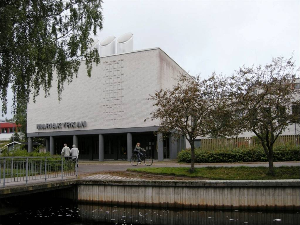 Mariakyrkans östra fasad med personalutrymmen i den låga delen till höger